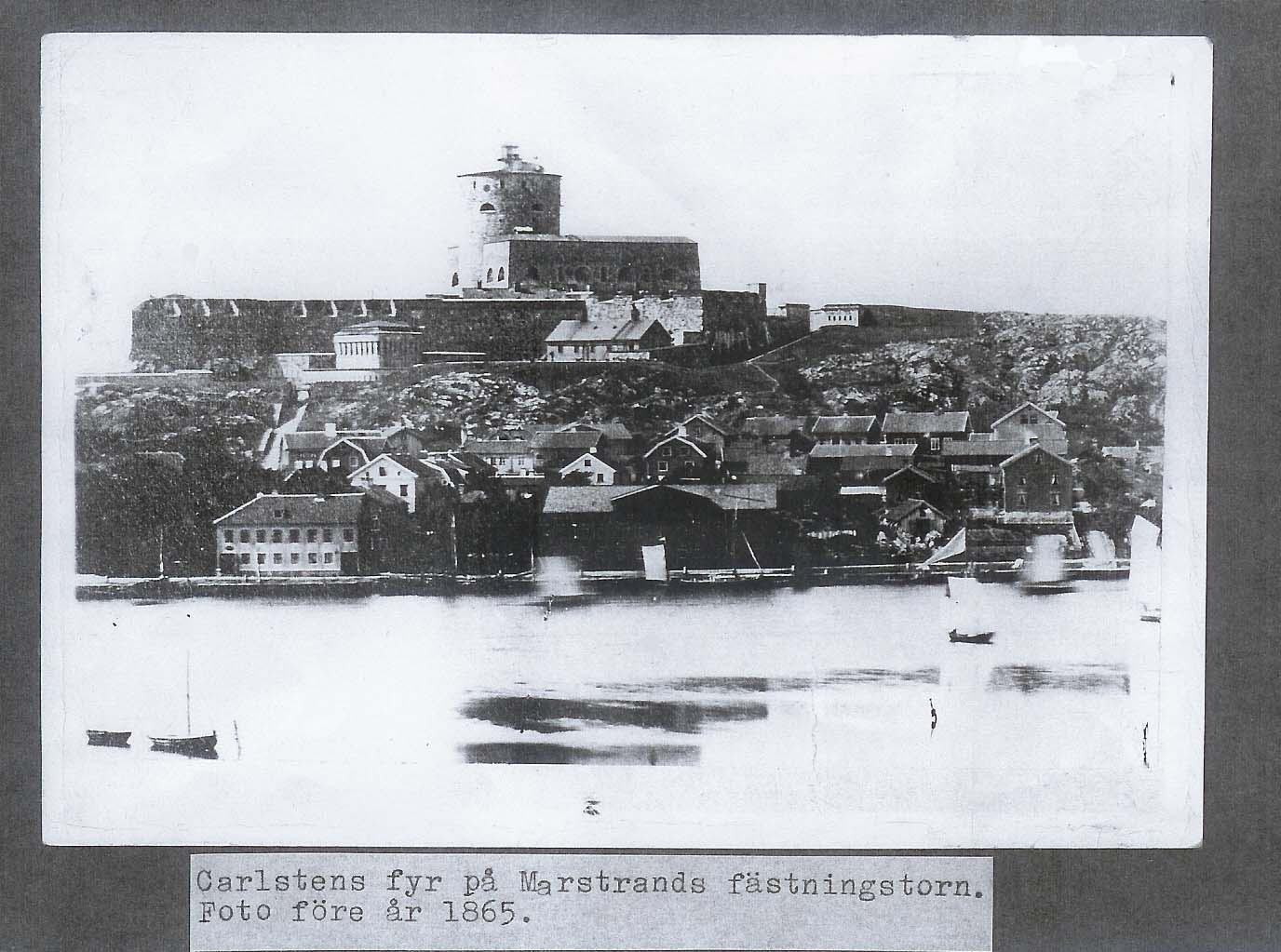 Världens första mekaniskt roterande fyr.